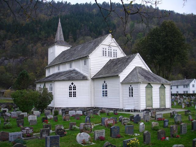 Bilete av Samnanger kyrkje